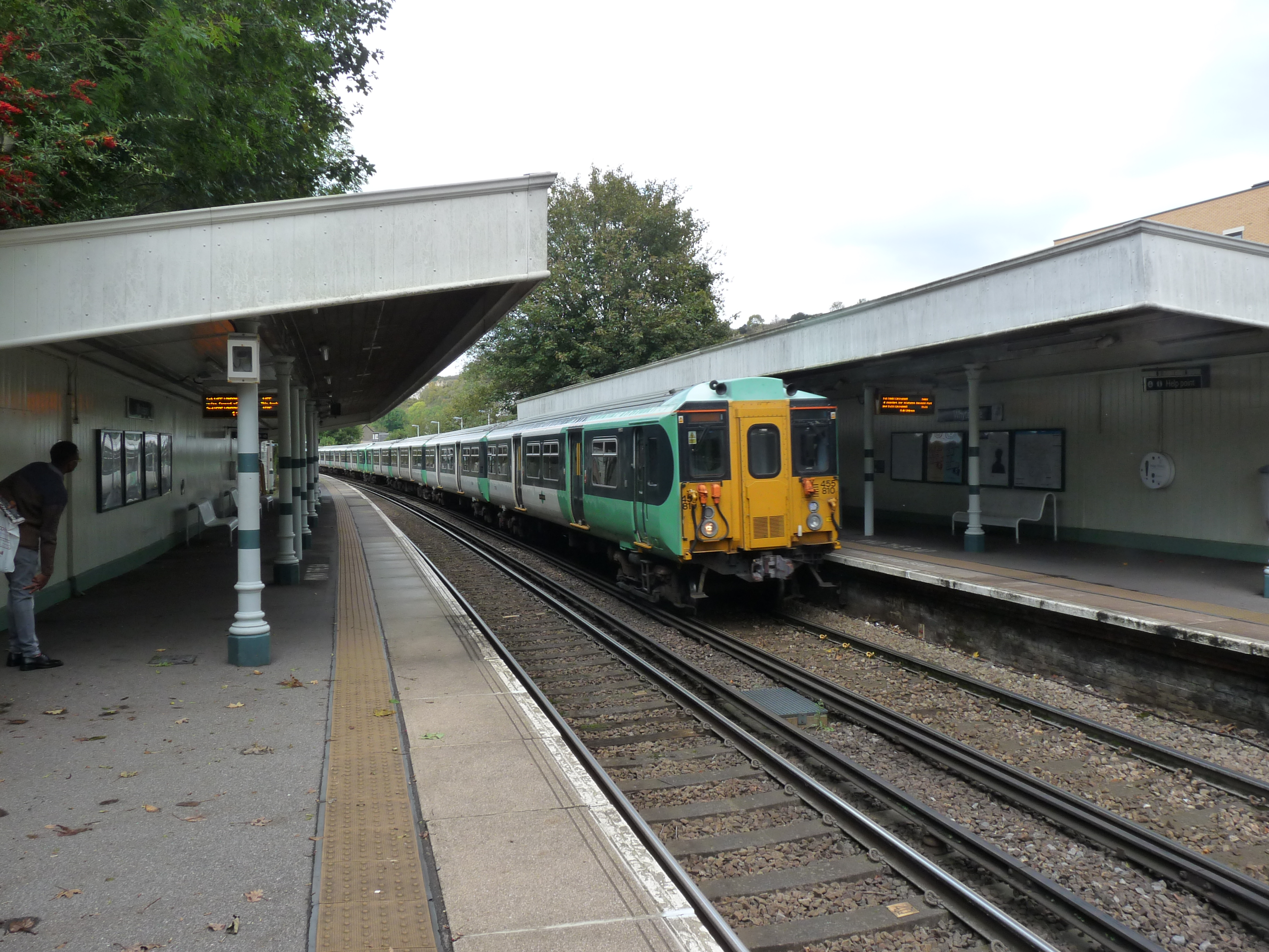 Een trein in station Whyteleafe